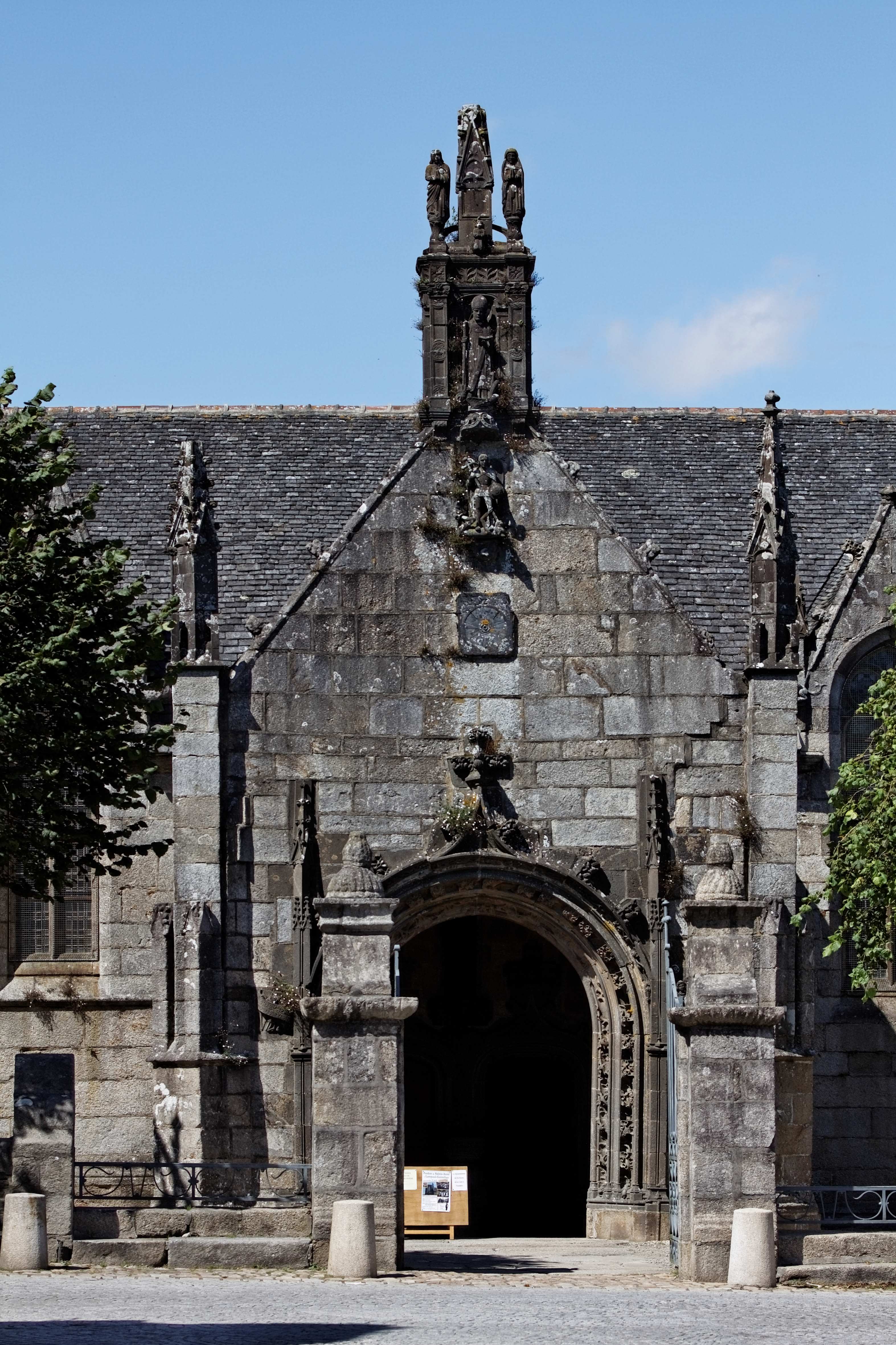 Vue de l'église Notre-Dame de Lampaul-Guimiliau.